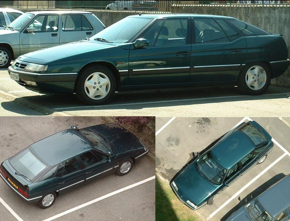 Description:Citroën XM 2.0 16V SX vert véga (1994)Source: ZalLicence